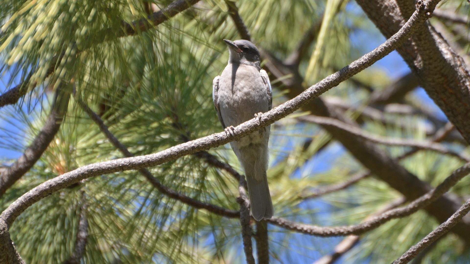 Oregon 2014